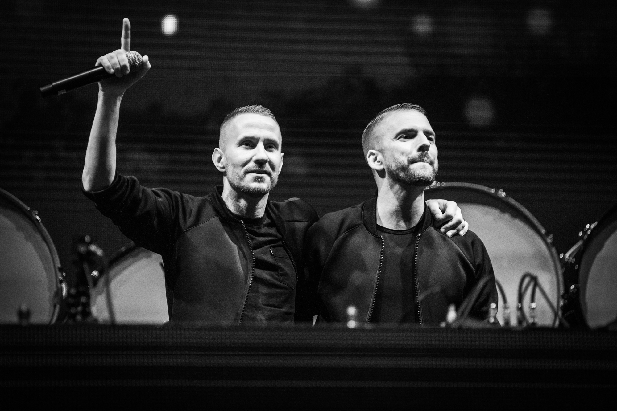 Galantis